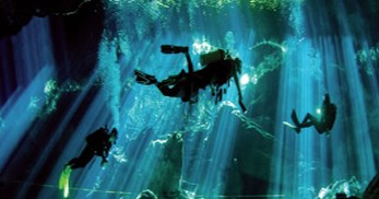 Plongée sous-marine en Cénote